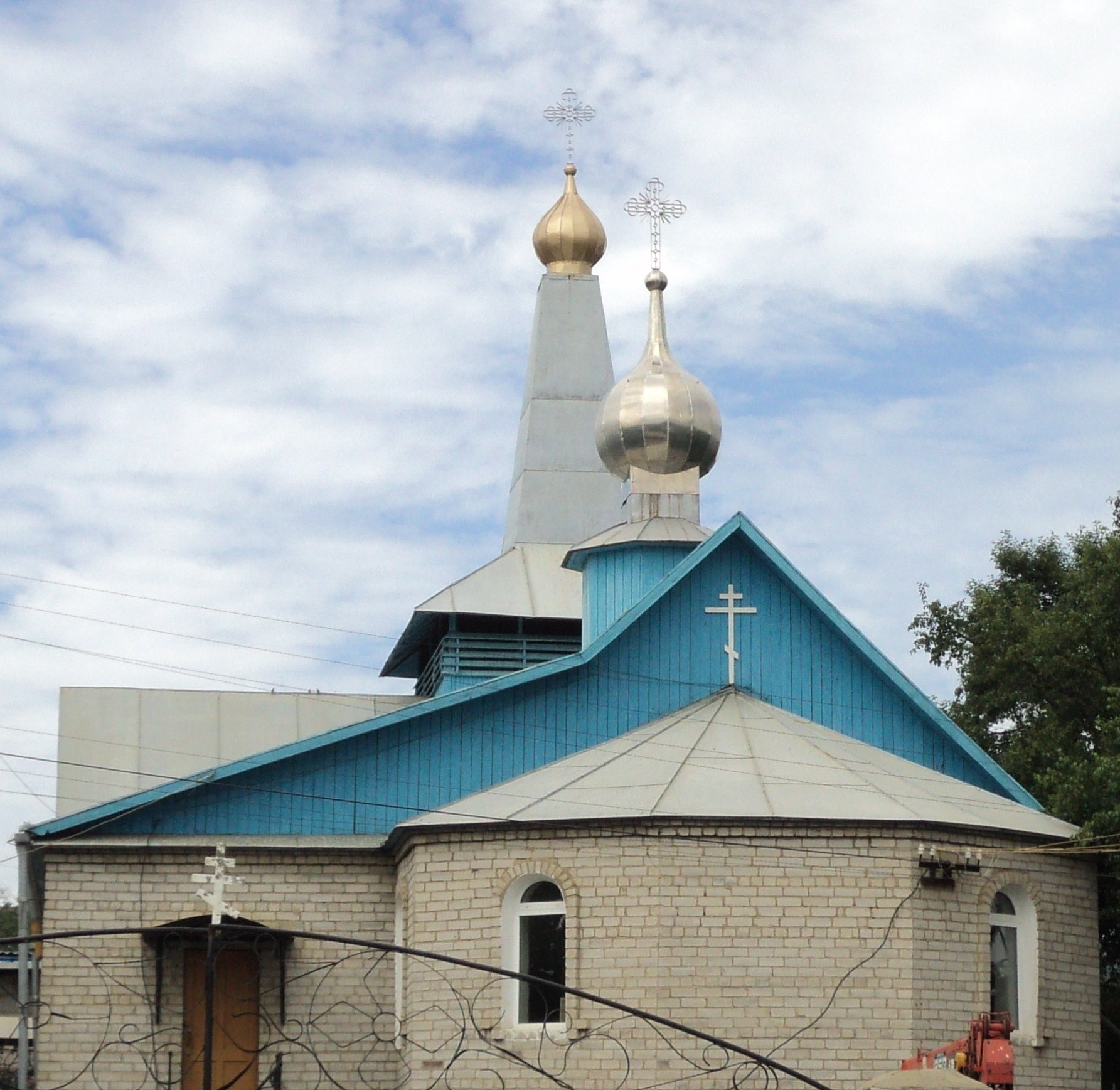 Храм Рождества Христова